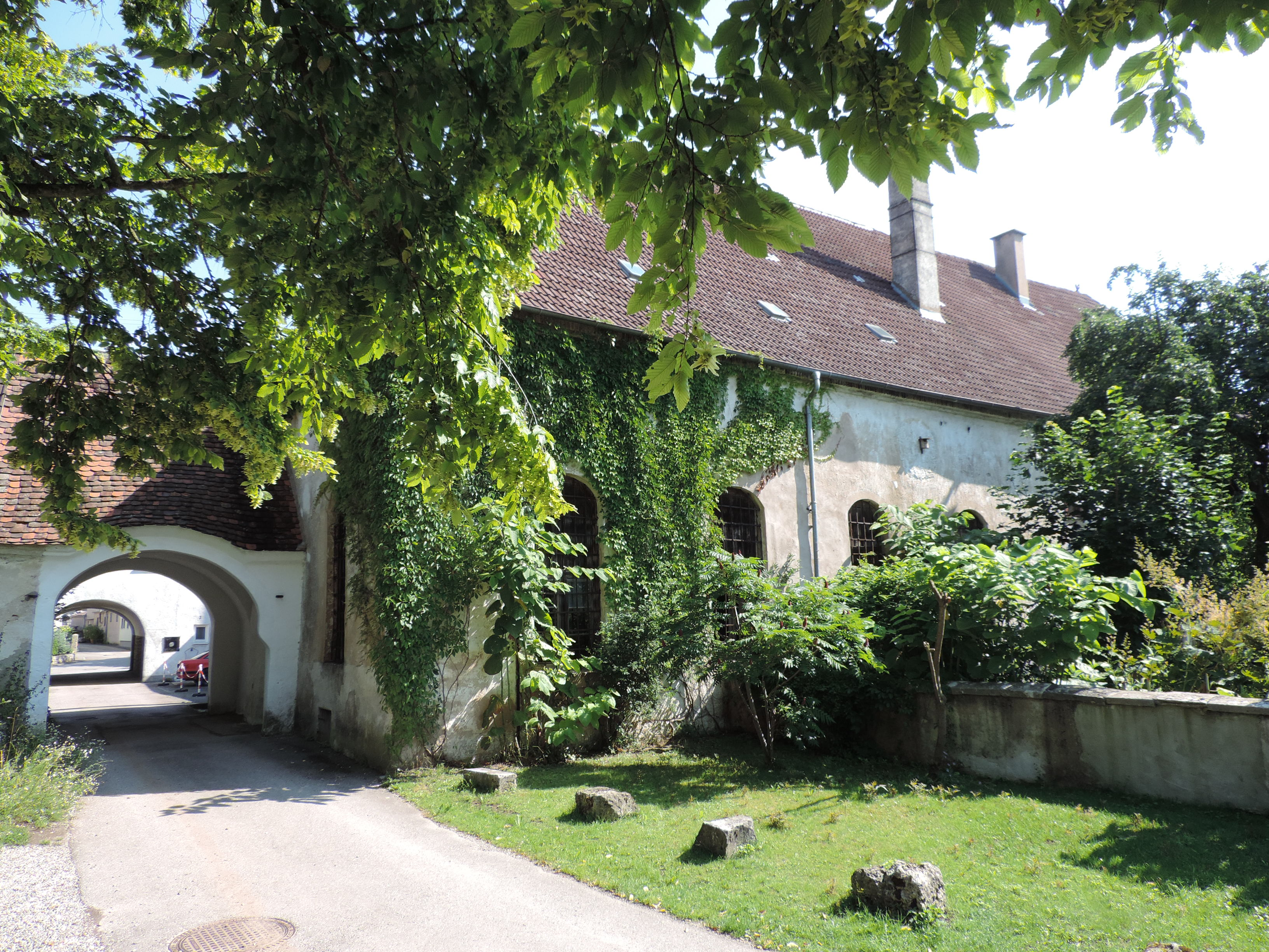 Tordurchfahrt mit Brauereihaus